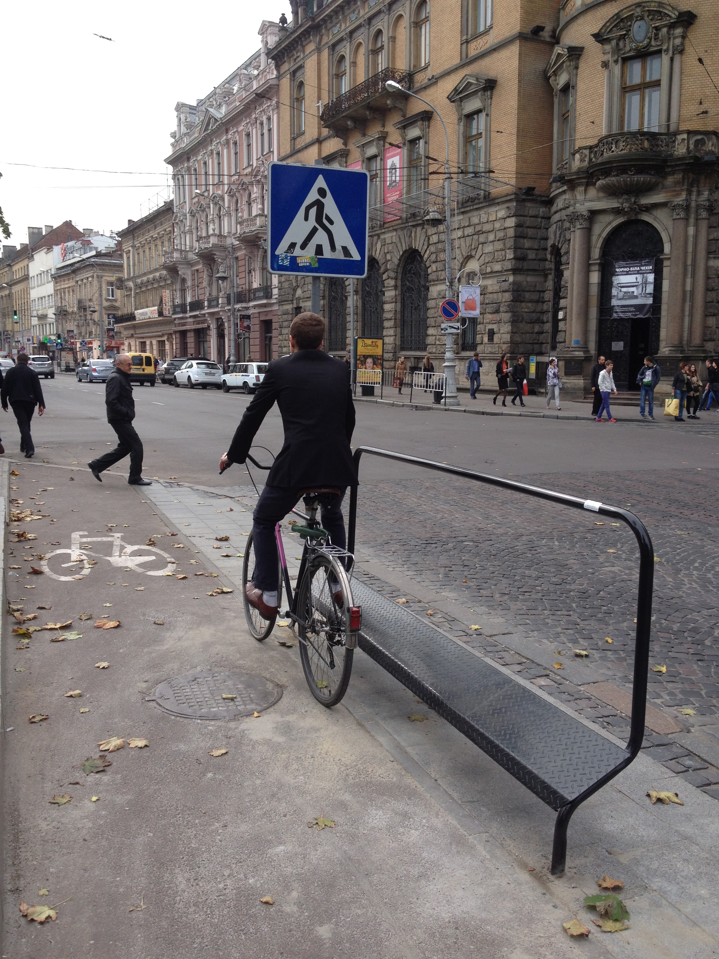 Велоопора на пр. Свободи, встановлена у 2014 році